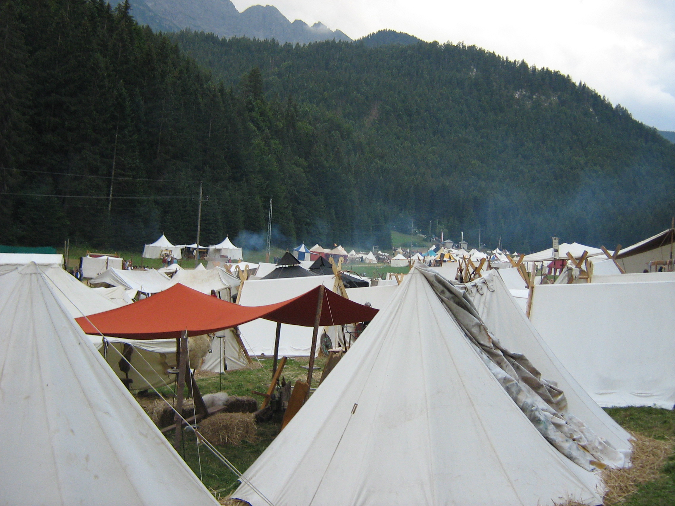 Blick auf den Lagerplatz von Ehrenberg - Die Zetreise 2007